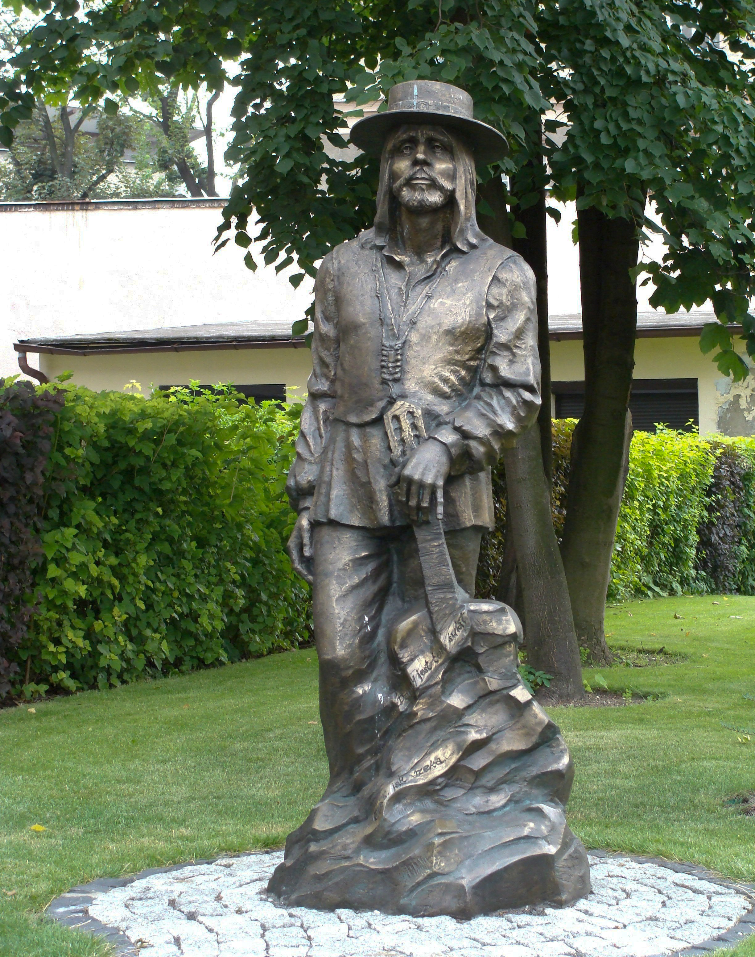 Pomnik Czesława Niemena obok Rektoratu UO w Opolu. Autor projektu: prof. Marian Molenda. Odlew: Wiktor Chalupczok.